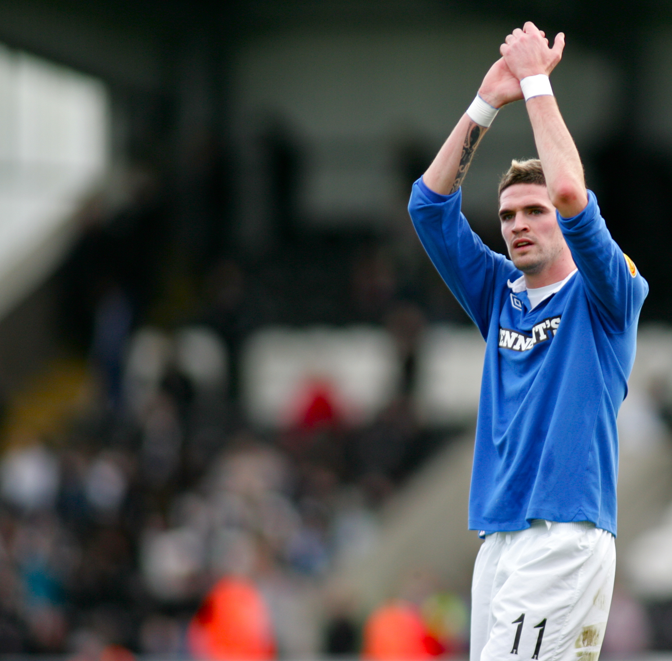 HI7Y0391